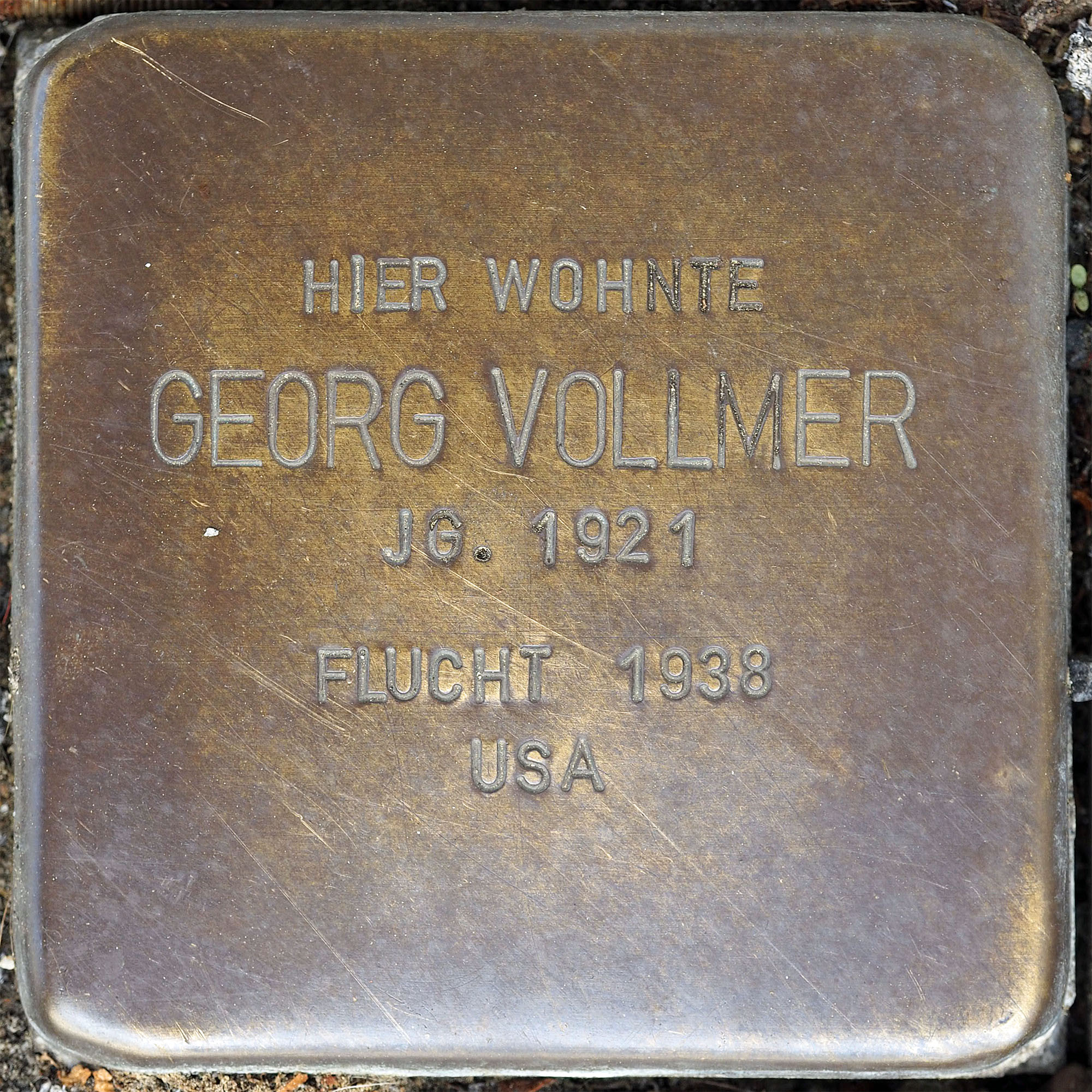 Stolpersteine MG: Vollmer, Georg